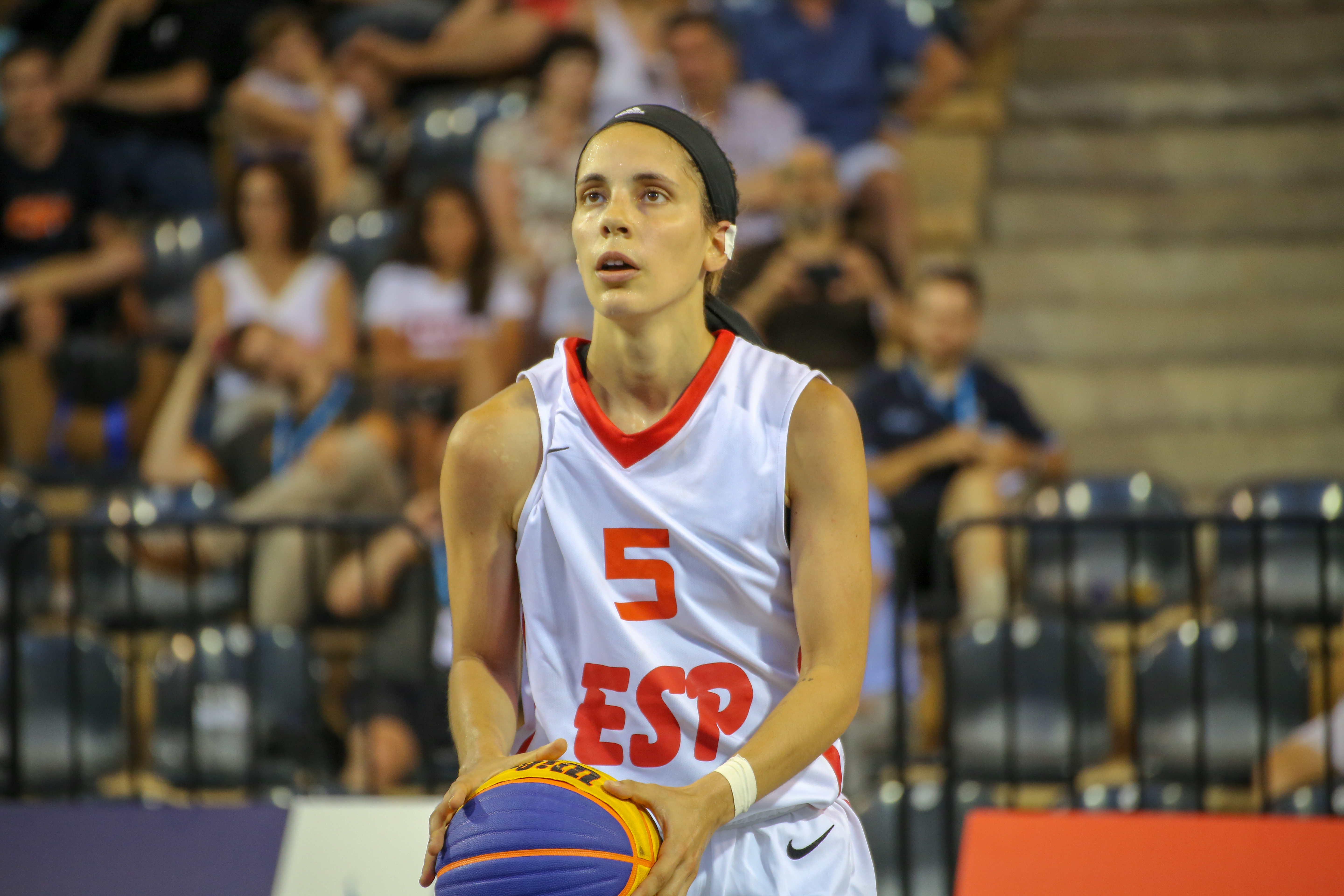 Marina Lizarazu en los Juegos del Mediterráneo 2018